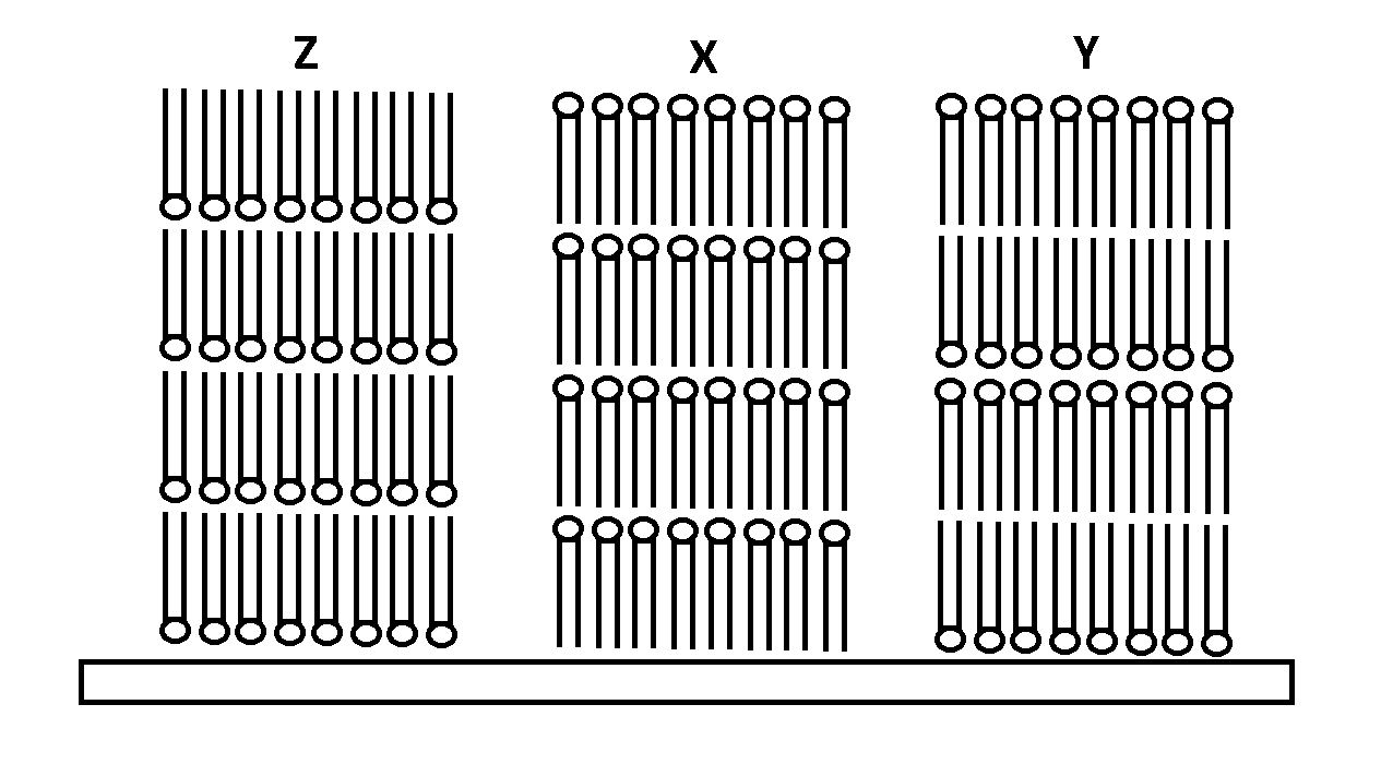 Tipo de arreglos de moléculas en filmes multicapas, el tipo Y se produce cuando las monocapas se depositan al sustrato sólido tanto en la dirección ascendente y como en la descendente. Cuando las monocapa se depositan solo en una dirección, la estructura resultante es tipo Z en el caso ascendente o X cuando es descendente